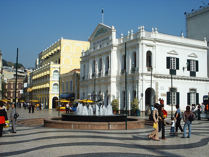 Одна из центральных площадей Макао / Macau centre. Главная площадь старого Макао известна мостовой из волнистой мозаики.